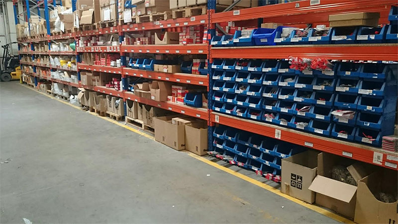 Almacen de ferreteria en Madrid Bricolemar